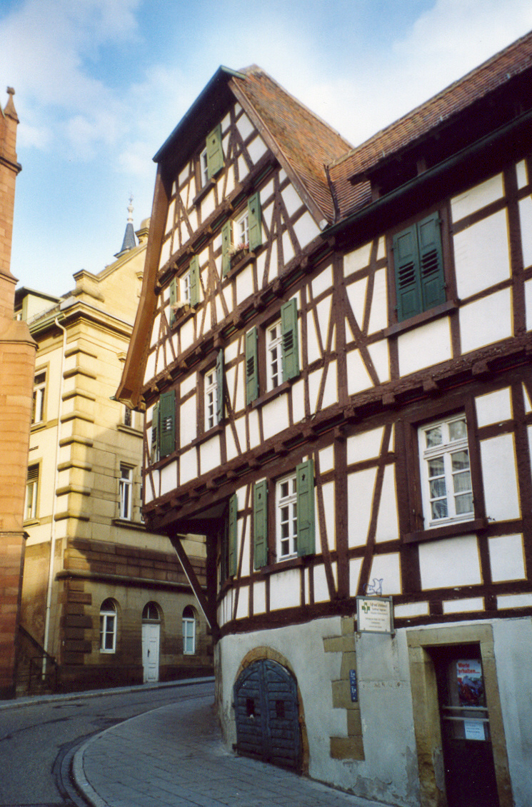 Bretten: das Heberer-Haus (Straßenseite)